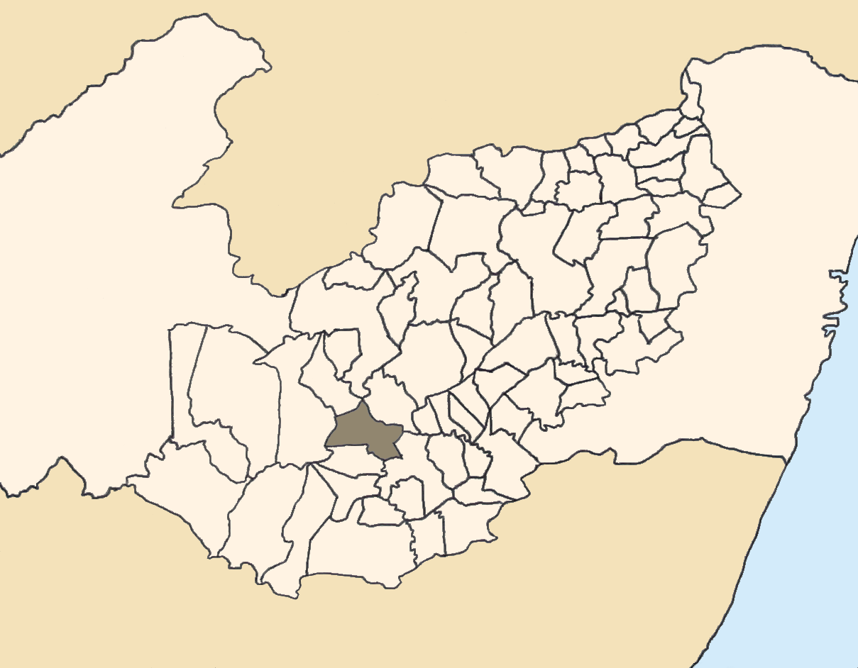 Mapa da mesorregião Agreste de Pernambuco (Brasil) subdivida em municípios. Em destaque, o município de Caetés. Map of the brazilian state of Pernambuco (mesorregião Agreste) showing the city of Caetés. Imagem tratada com o GIMP. Image made with GIMP.